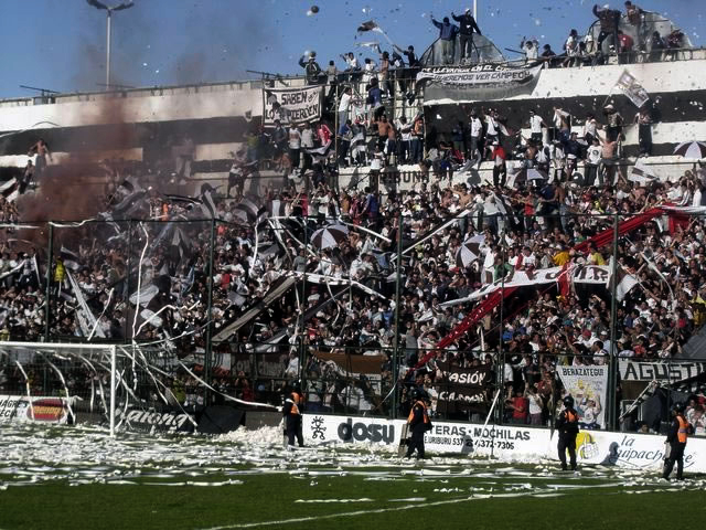 El estadio del Club Atletico Platense